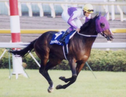 スペシャルウィーク（1999年10月31日、東京競馬場にて撮影、撮影者本人）